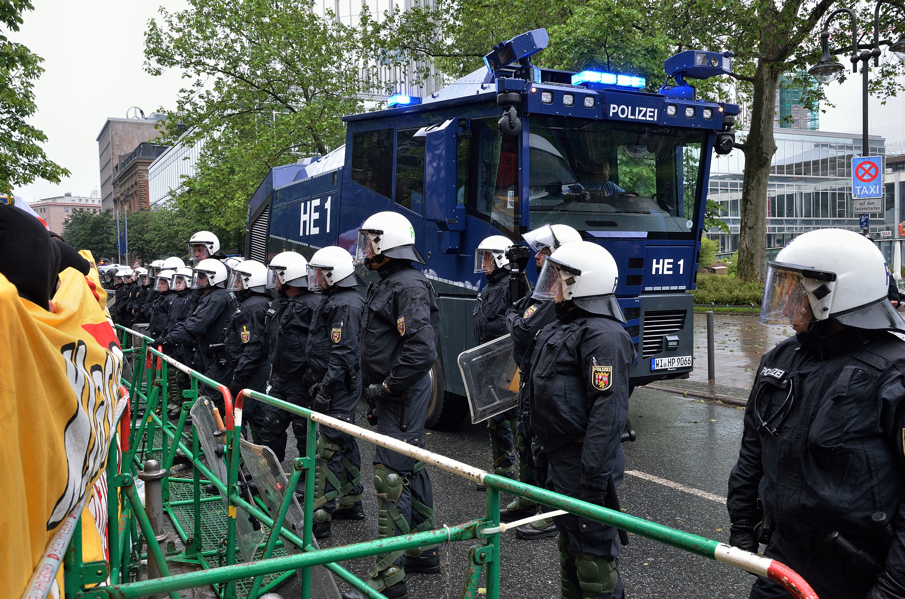 Blockupy 2013: Sicherung der EZB